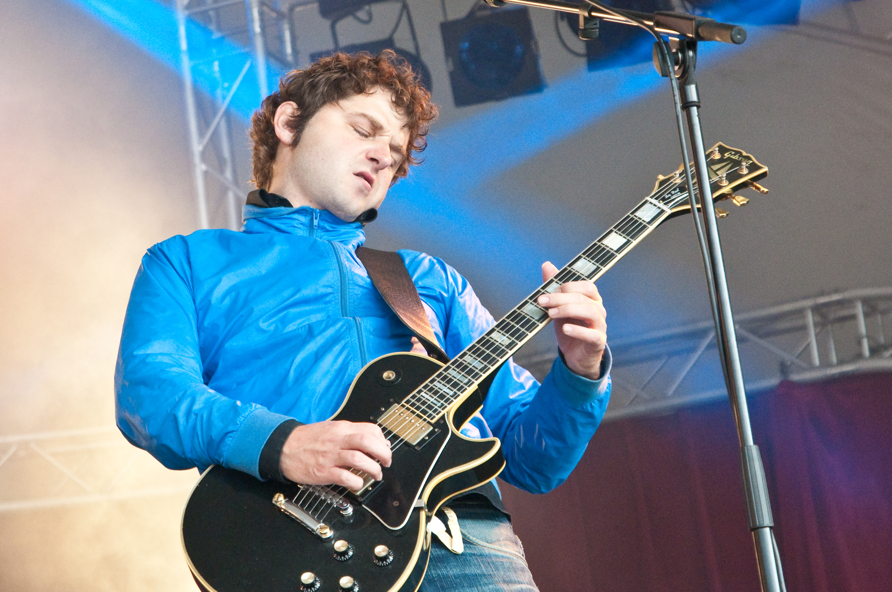 Hun laatste festivaloptreden. Into The Great Wide Open op Vlieland van 4 tot en met 6 september 2009.